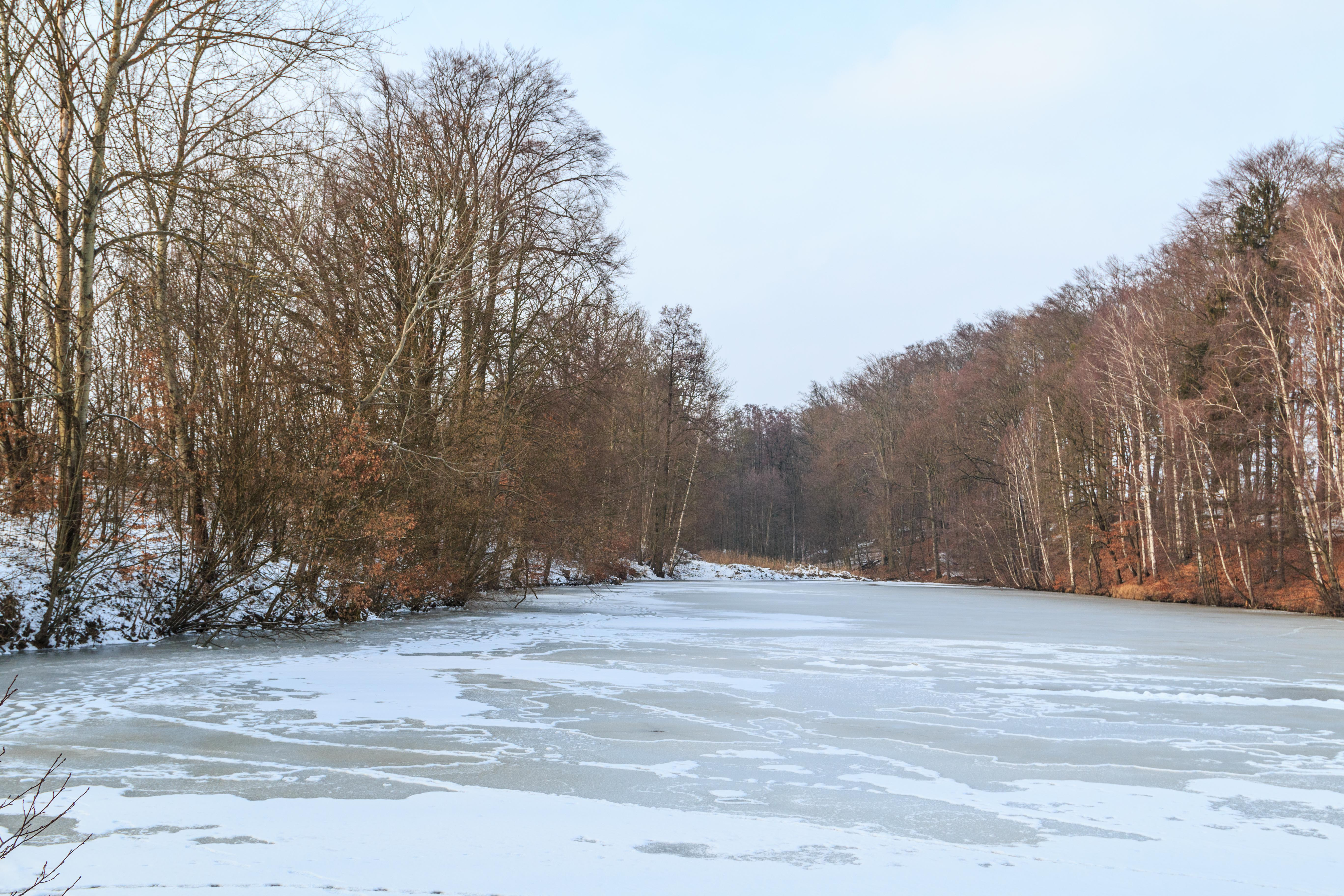 rybník Jiřinka u Leštiny